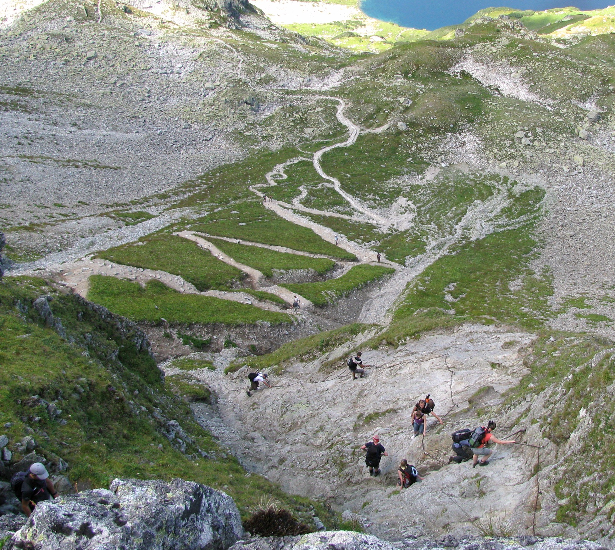 Górna, ubezpieczona łańcuchami część szlaku z Doliny Pięciu Stawów Polskich na Szpiglasową Przełęcz.